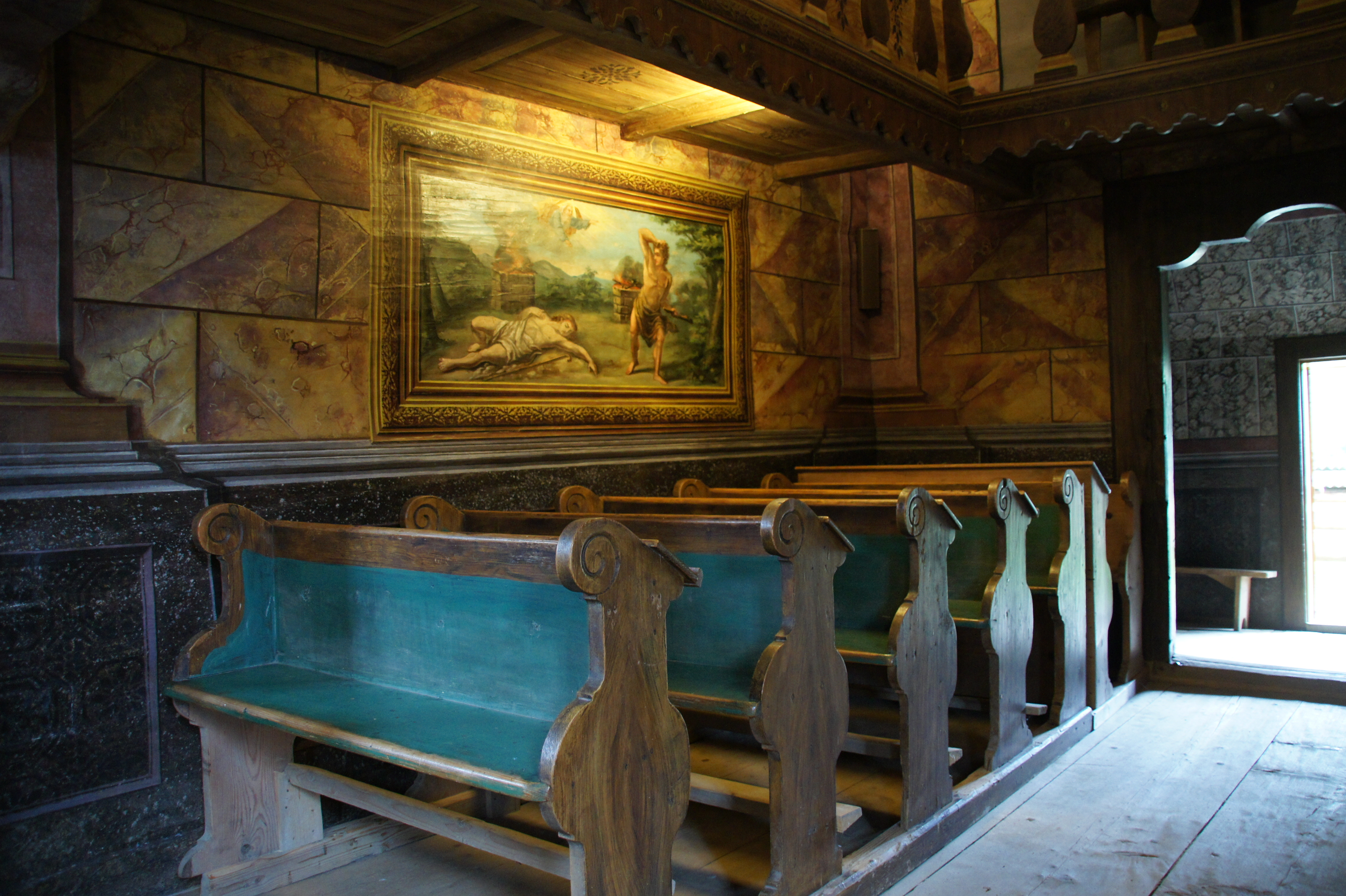 Kwiatoń - dawna cerkiew greckokatolicka, obecnie rzymskokatolicki kościół filailny, ok. 1700